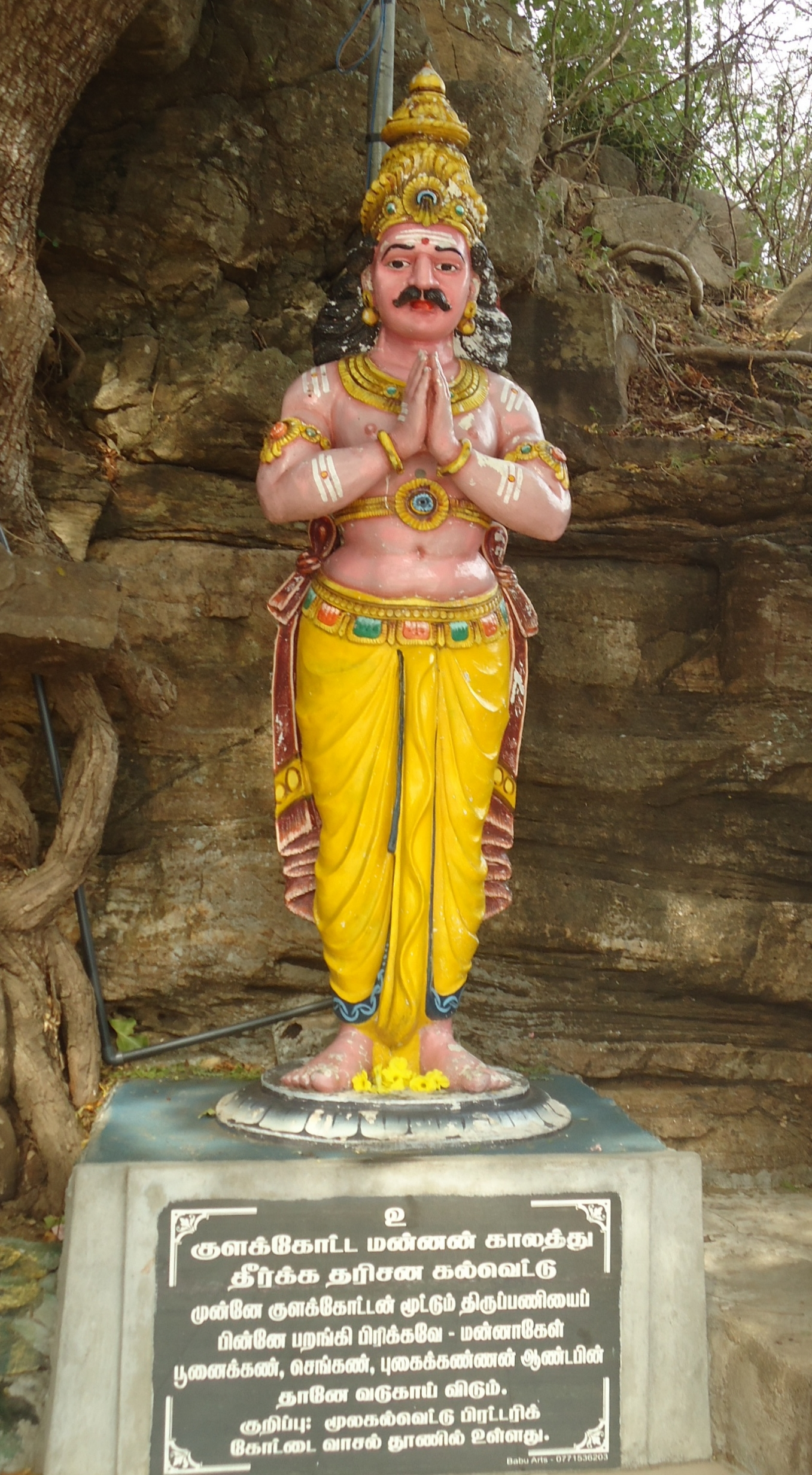 திருக்கோணேச்சரத்திலுள்ள குளக்கோட்ட மன்னனது உருவச்சிலை